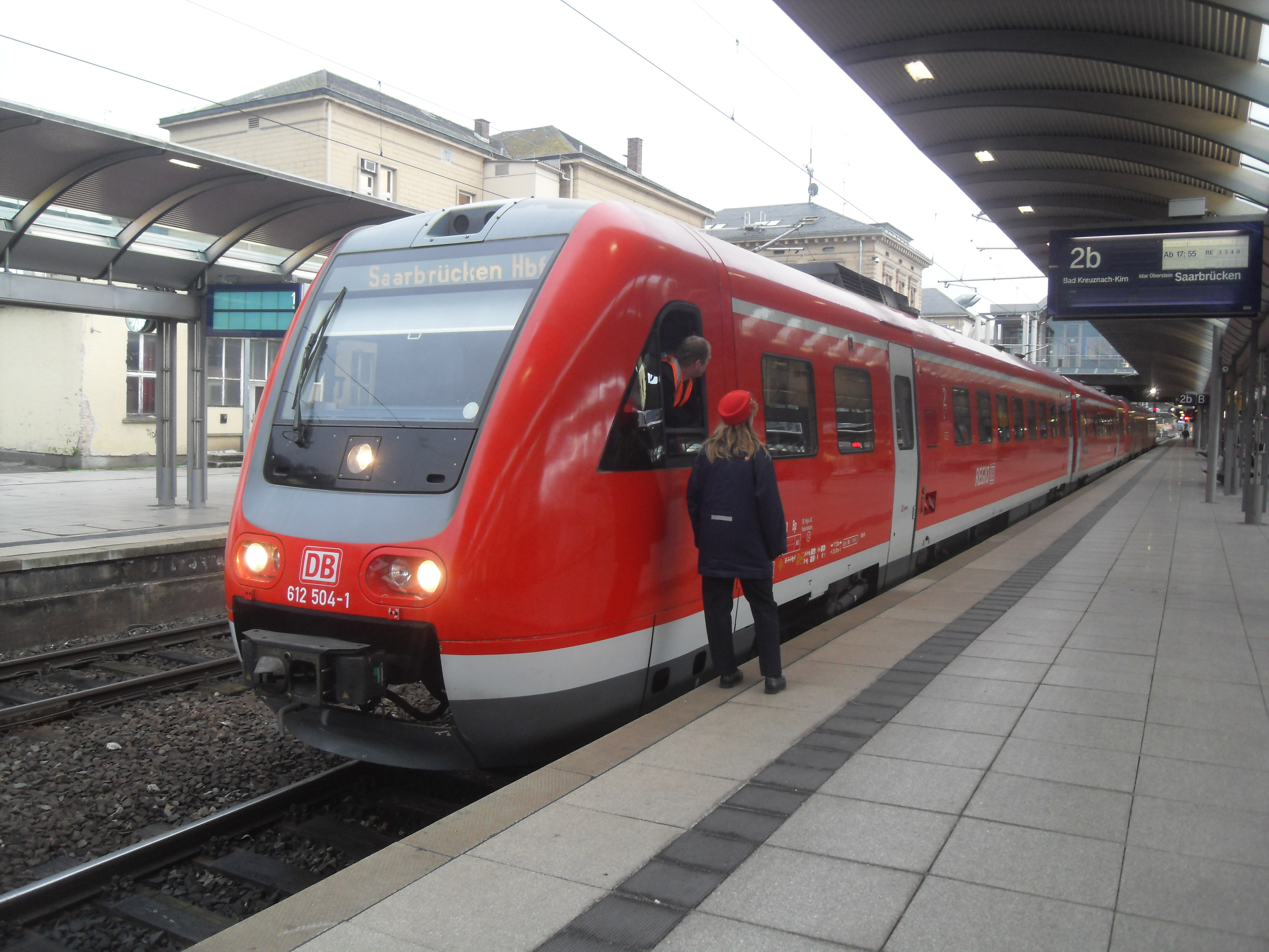 DBAG-Baureihe 612 als Nahe-Express im Mainzer Hauptbahnhof